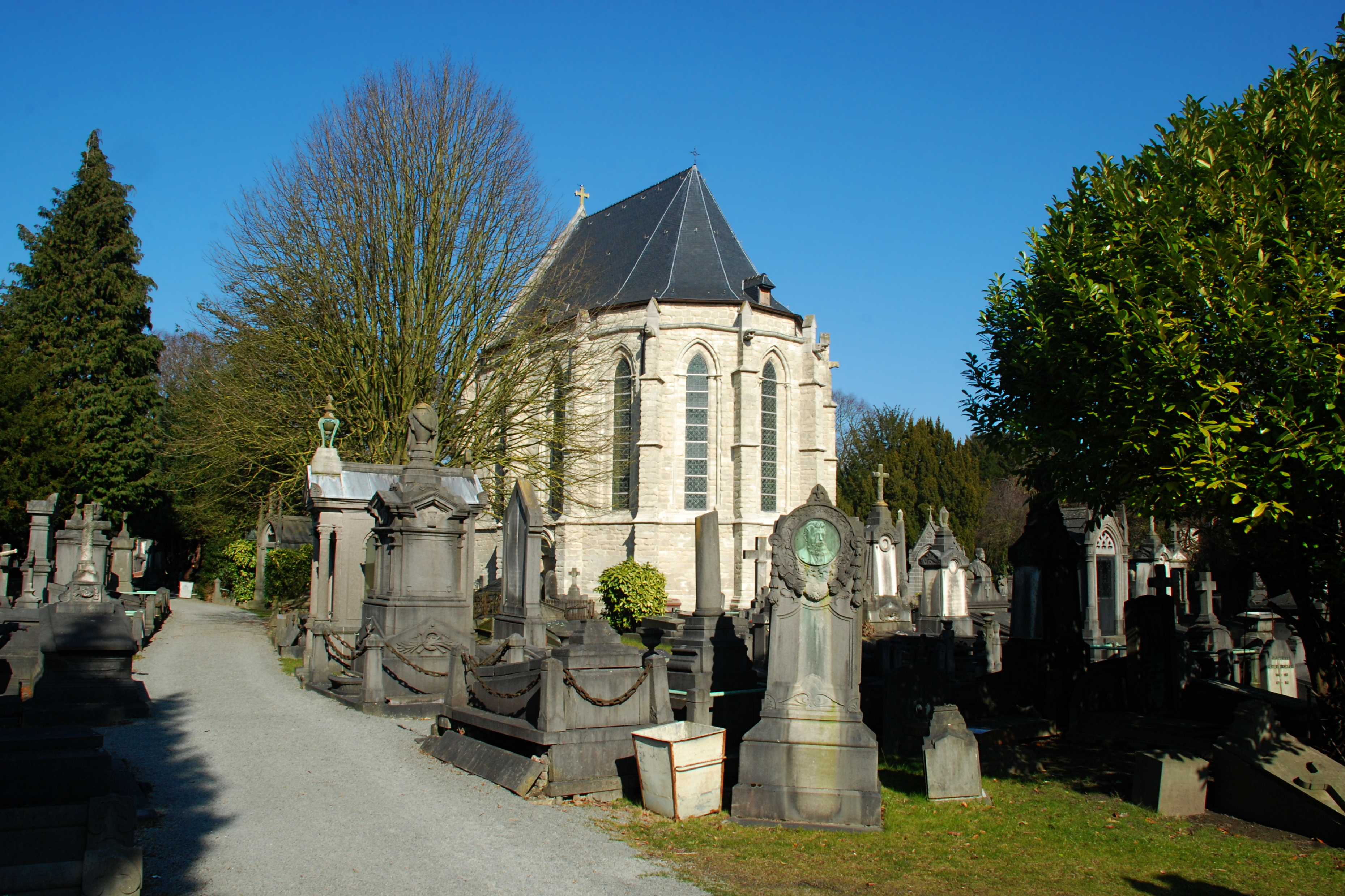 Belgique - Bruxelles - Ancienne église Notre-Dame de Laeken (gothique 13e siècle)